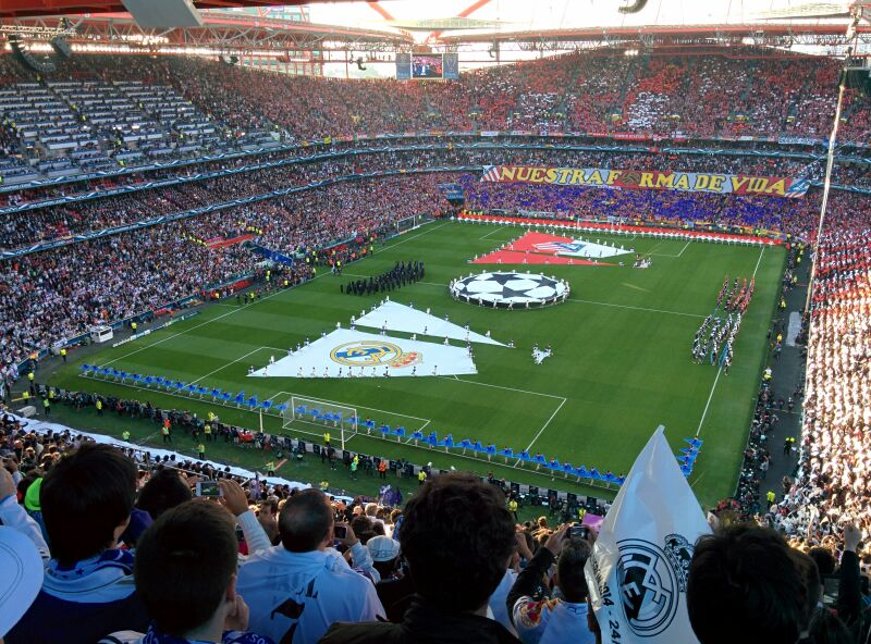 Real Madird 4:1 Atletico 2014 Final Champions Lisboa